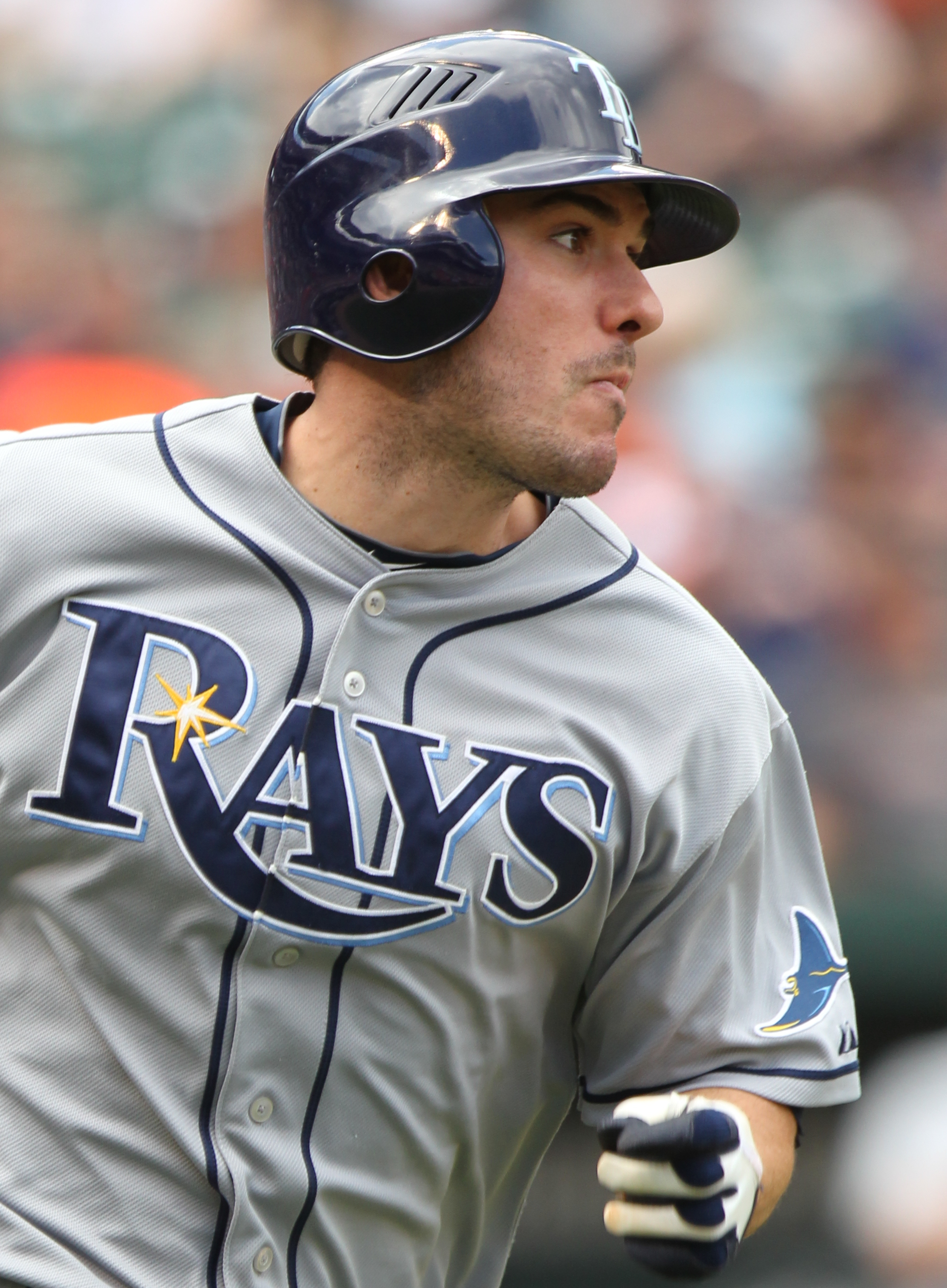 Matt Joyce